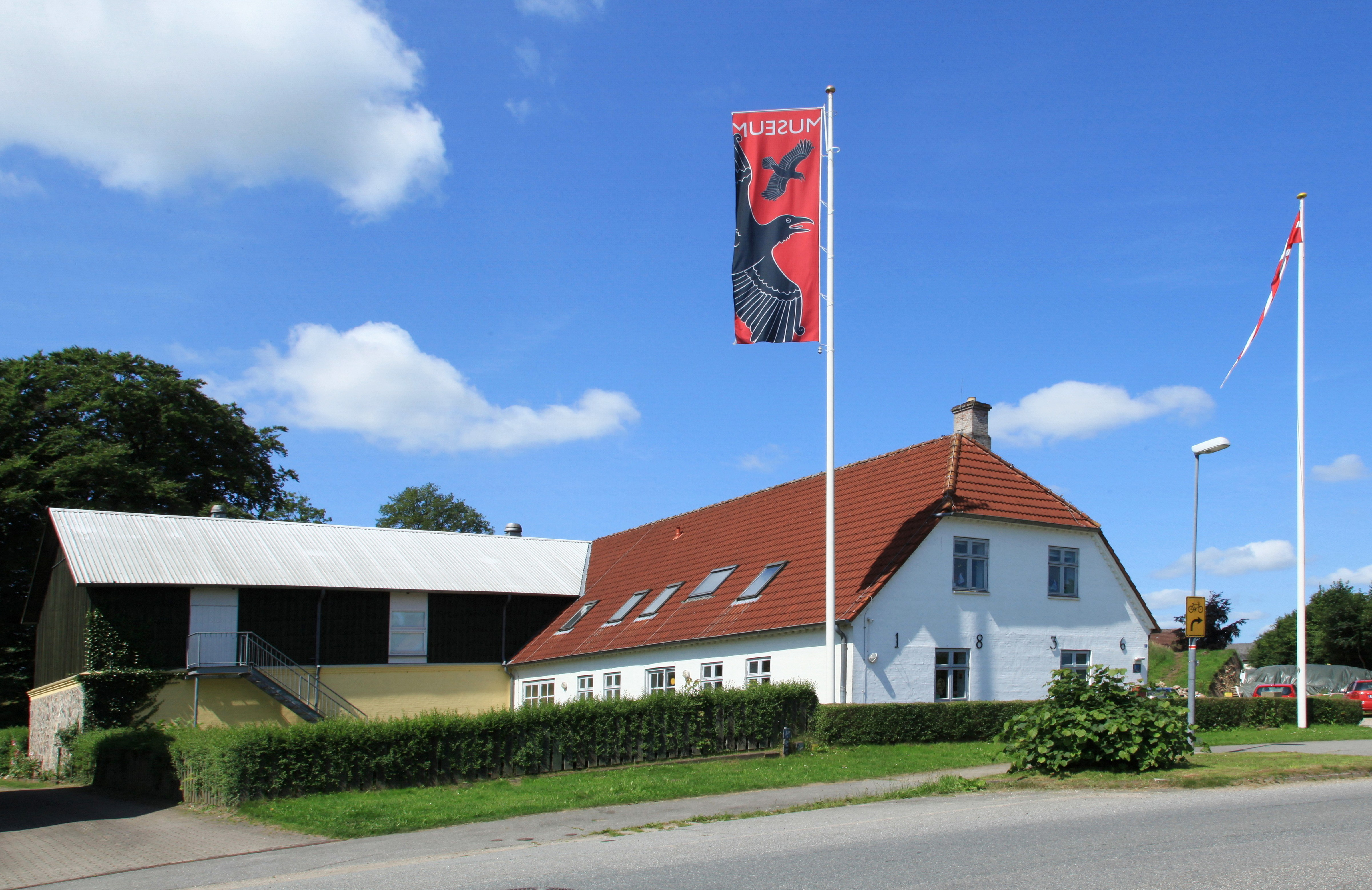 Danewerk Museum an der Straße Ochsenweg in Dannewerk